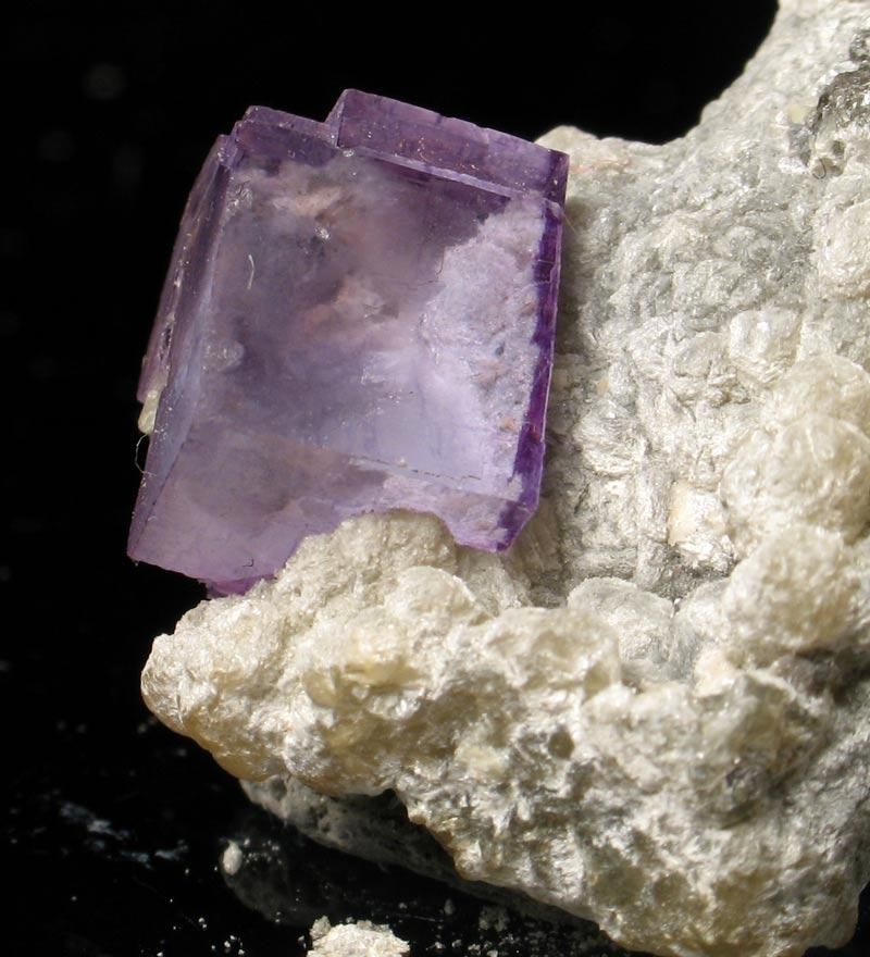 fluoryt i kalcyt, pochodzenie Chiny, autor zdjęcia Stowarzyszenie Spirifer